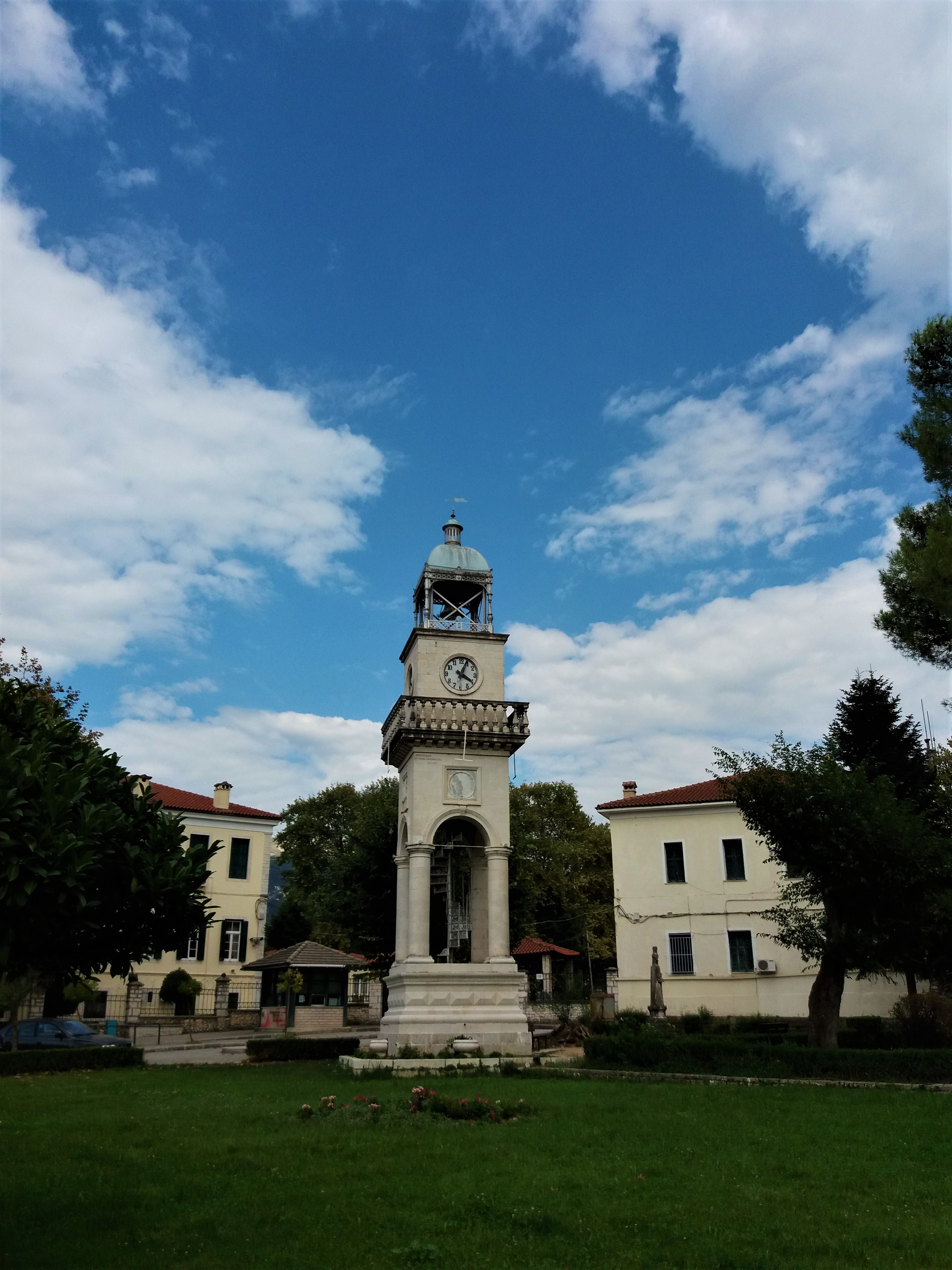 Ρολόι στην Κεντρική Πλατεία στα Ιωάννινα«Ρολόι στην Κεντρική Πλατεία στα Ιωάννινα»